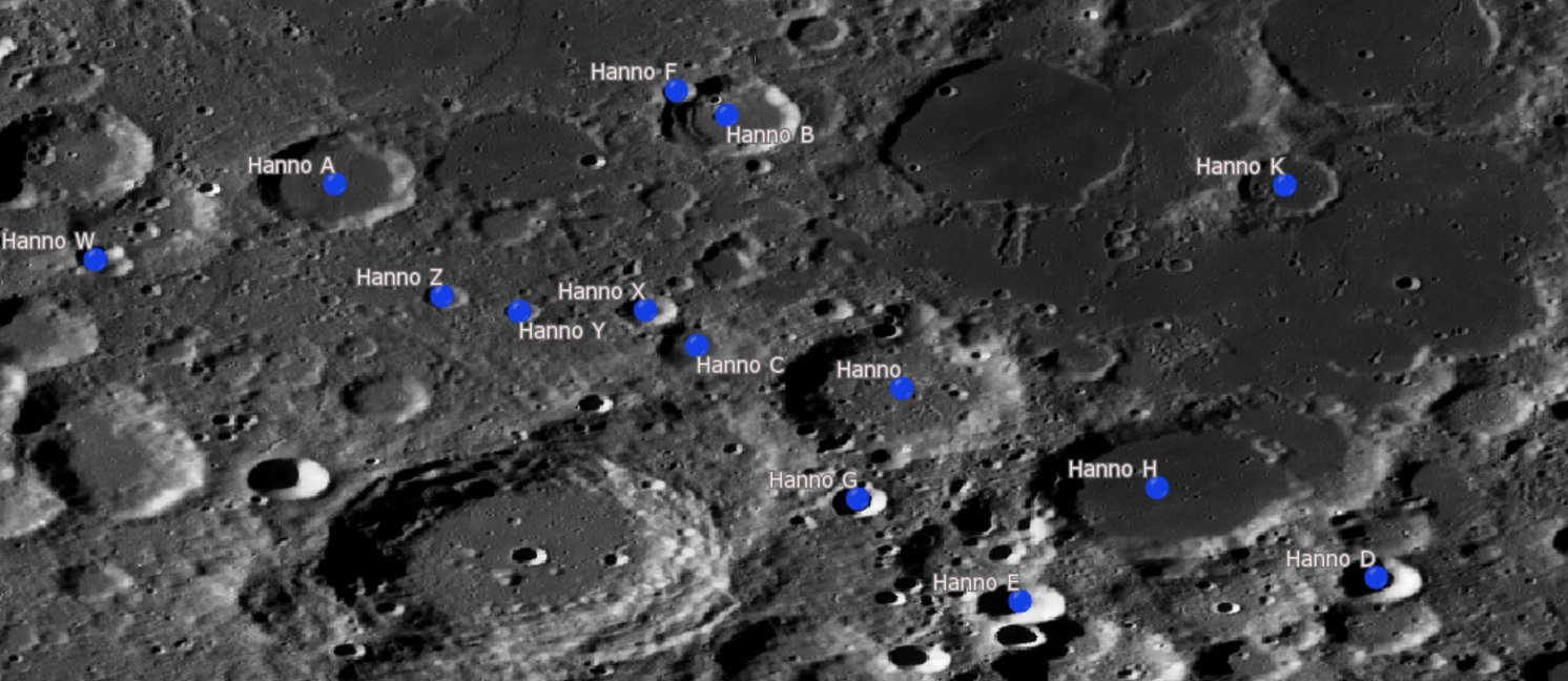 Crater lunar Hanno. Cráteres Satélite. (Imagen LRO)